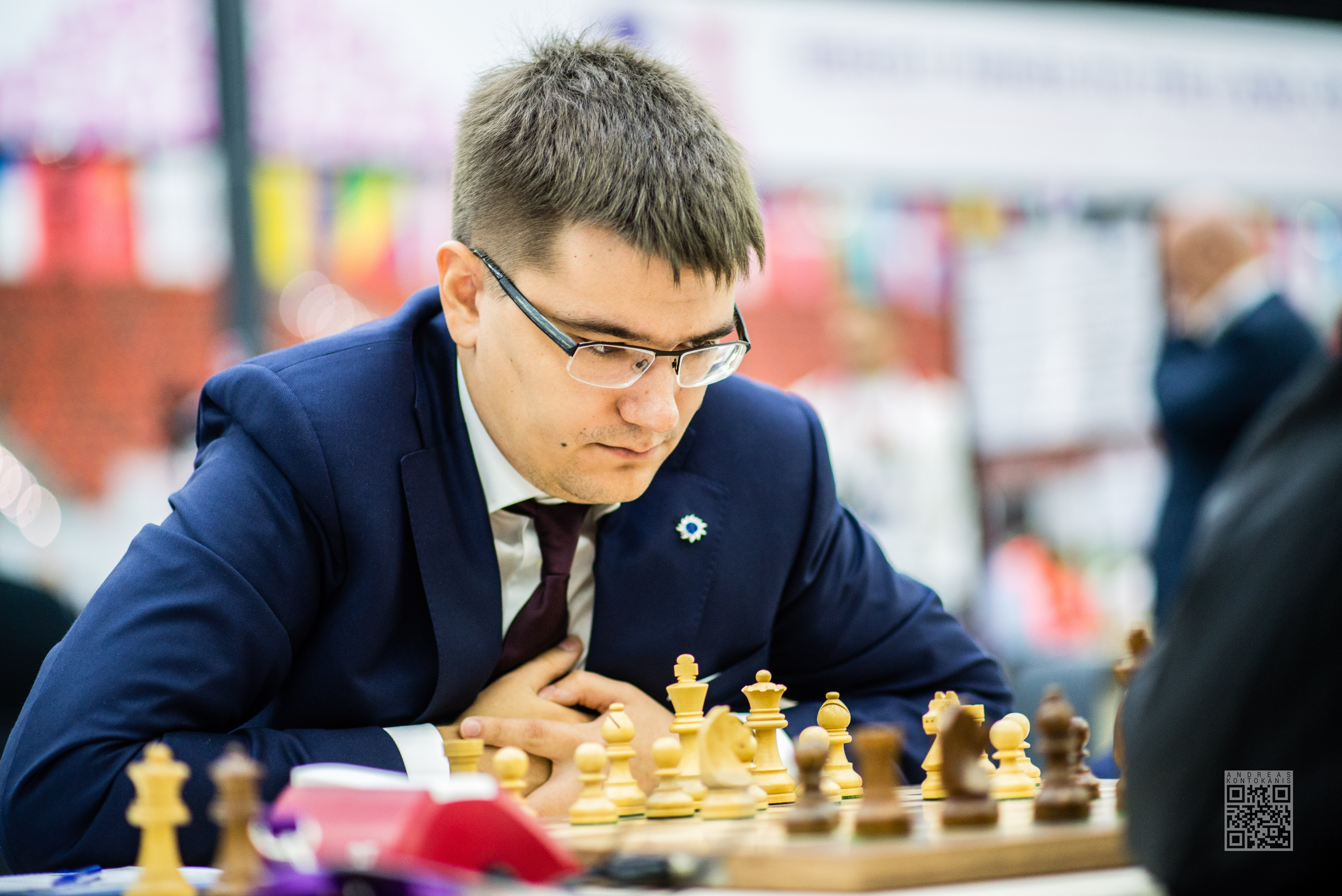 Tomashevsky Evgeny